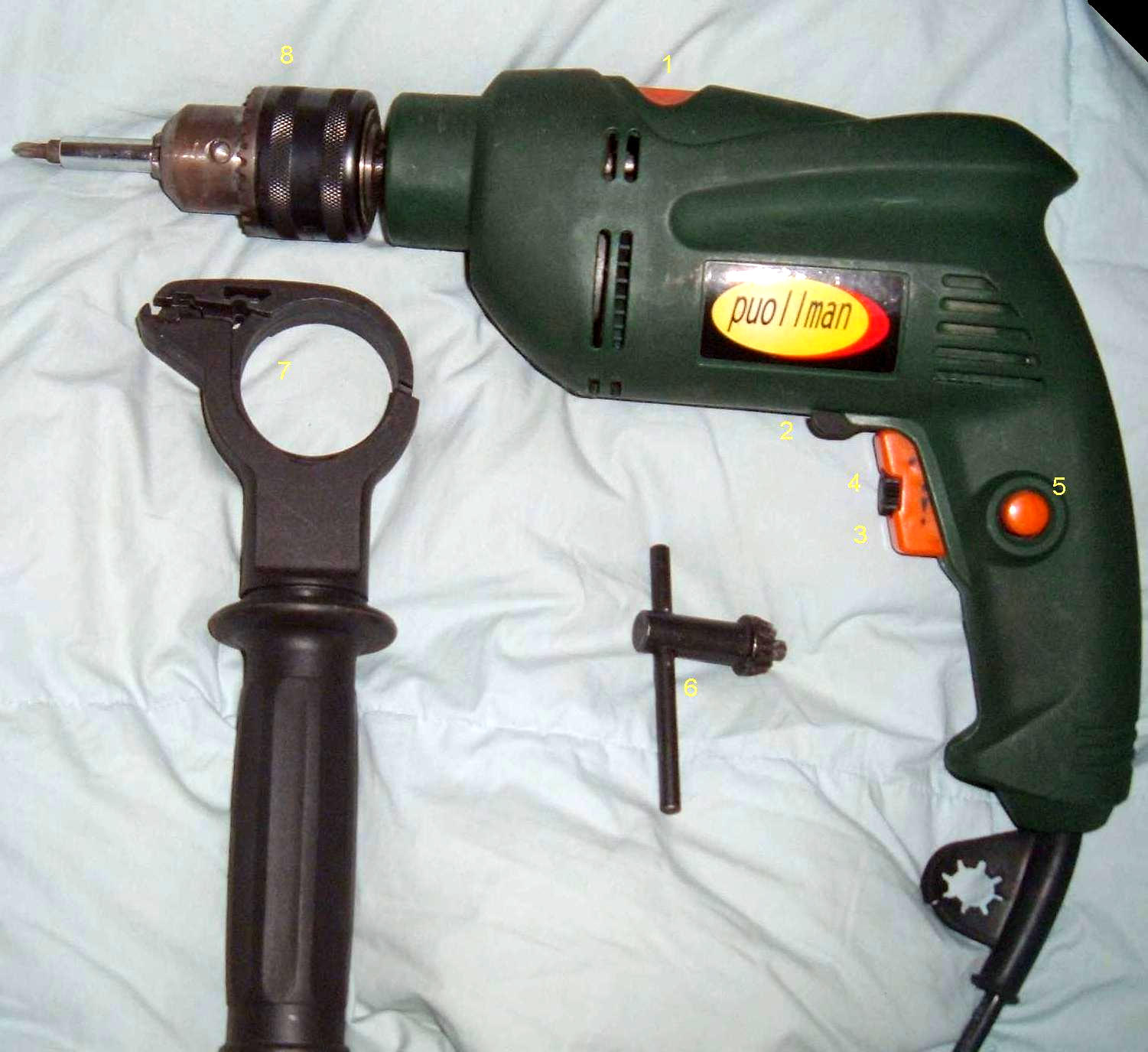 מקדחה